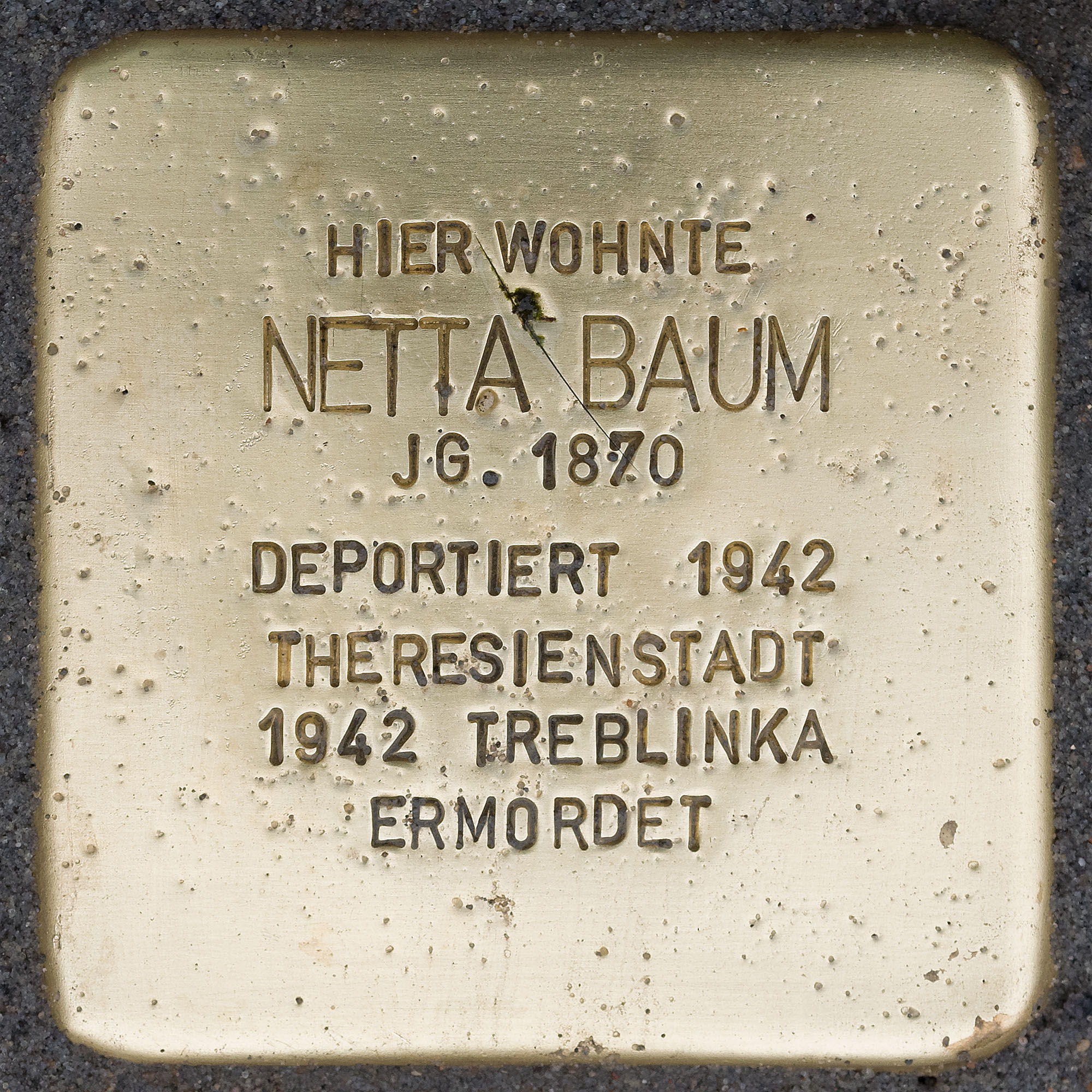 Stolpersteine Suechteln: Baum, Netta